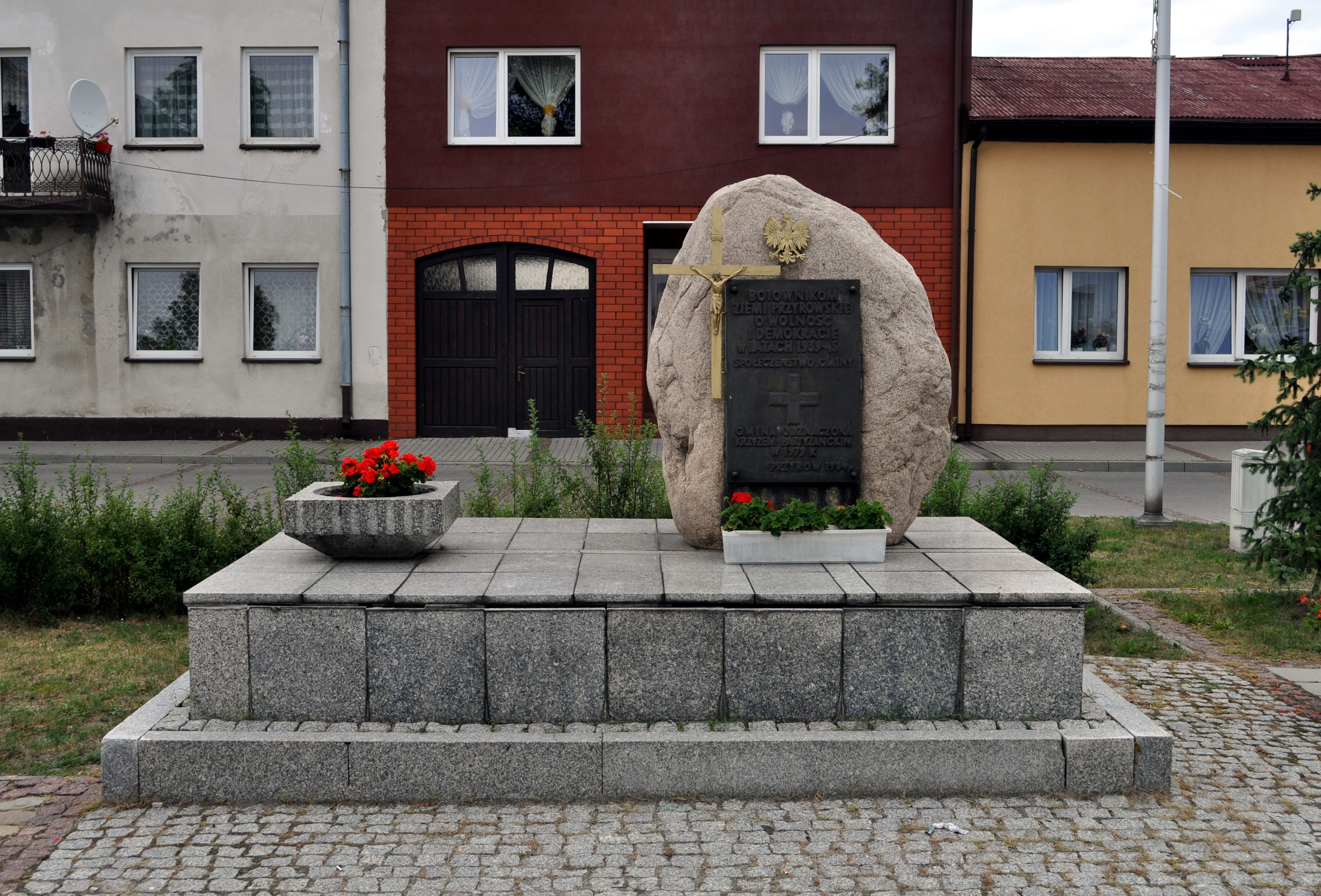 Ten obiekt znajduje się w Ewidencji Miejsc Pamięci Województwa Śląskiego dla miejscowości Przyrów pod numerem 114/01.Opis